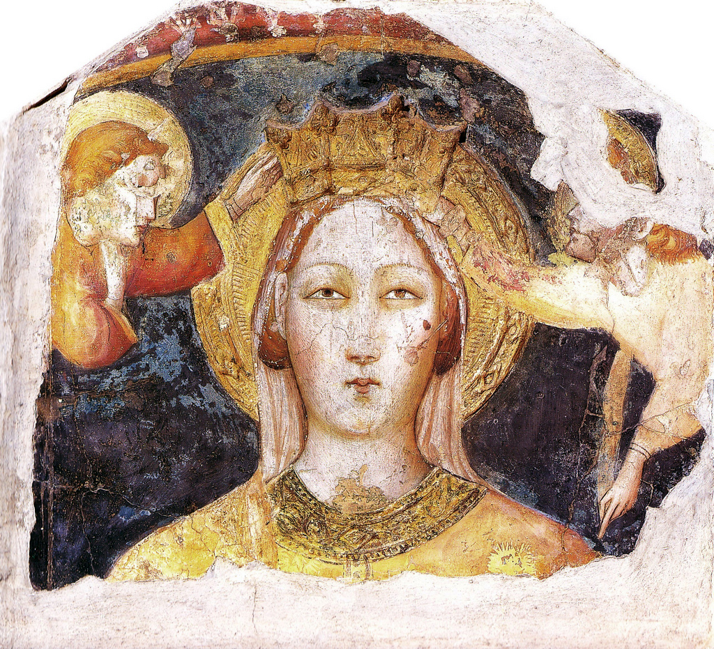 scansione di foto riproducente il dipinto di Olivuccio di Ciccarelloa Incoronazione della Vergine